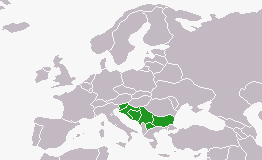 Южнославянски държави. (взето от